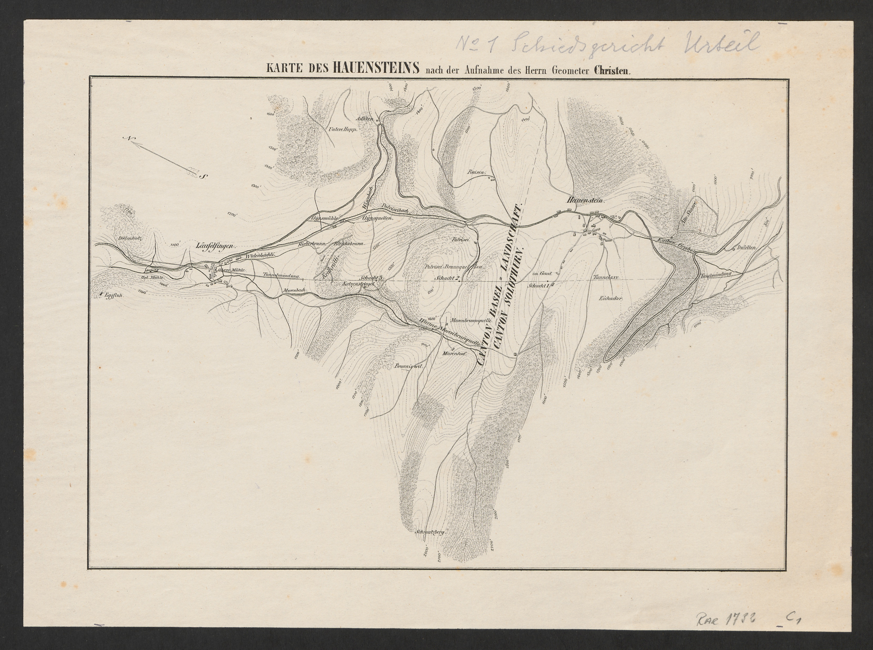 Karte des Hauensteins nach der Aufnahme des Herrn Geometer Christen. Die Karte zeigt den Hauensteintunnel mit den drei Schächten, von denen aus - zusätzlich zu den Portalen - der Bau erfolgte.